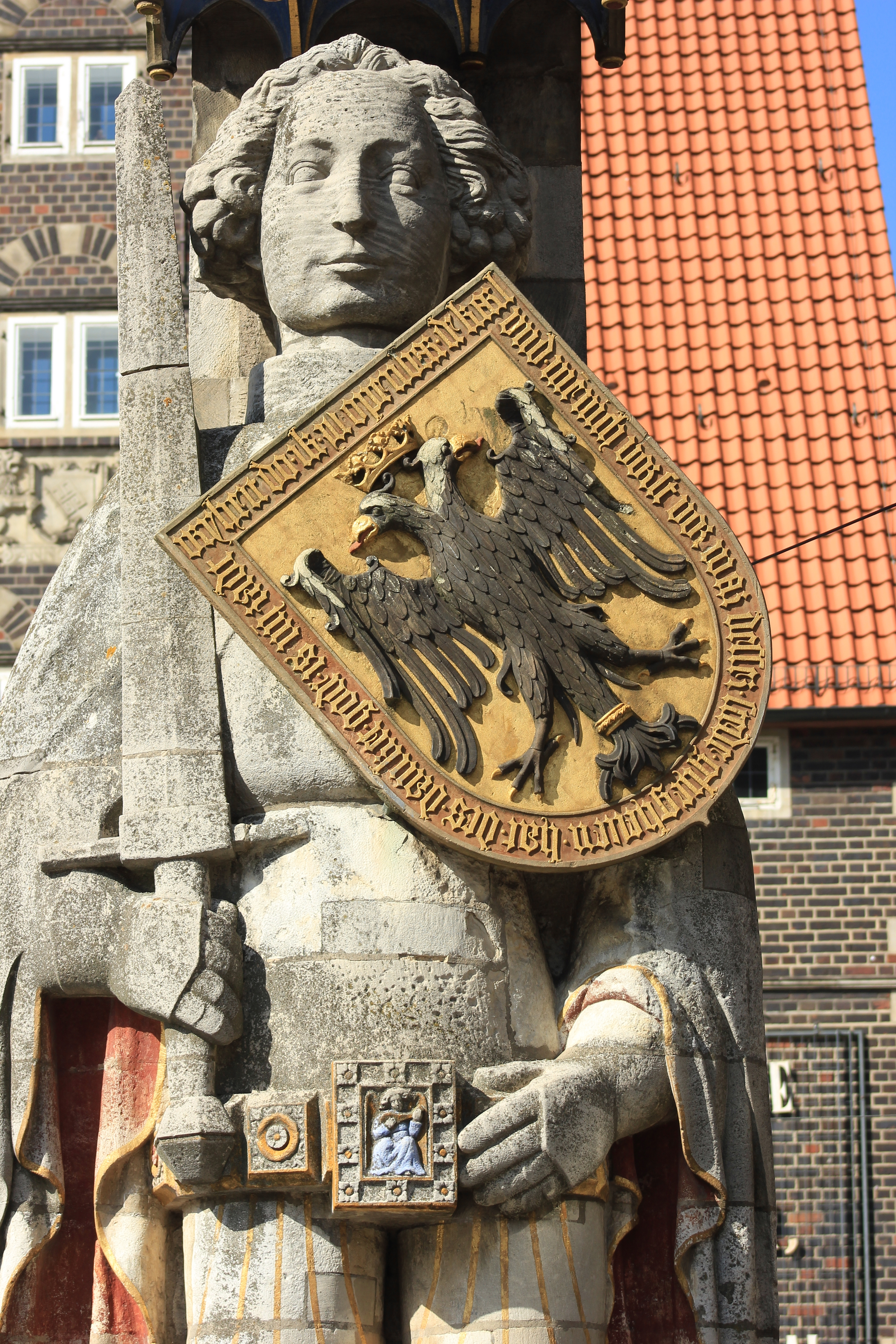 Roland in Bremen, Am MarktDas abgebildete Objekt ist ein geschütztes Kulturdenkmal in der Freien Hansestadt Bremen, mit der Nr. 0067 beim Landesamt für Denkmalpflege registriert.